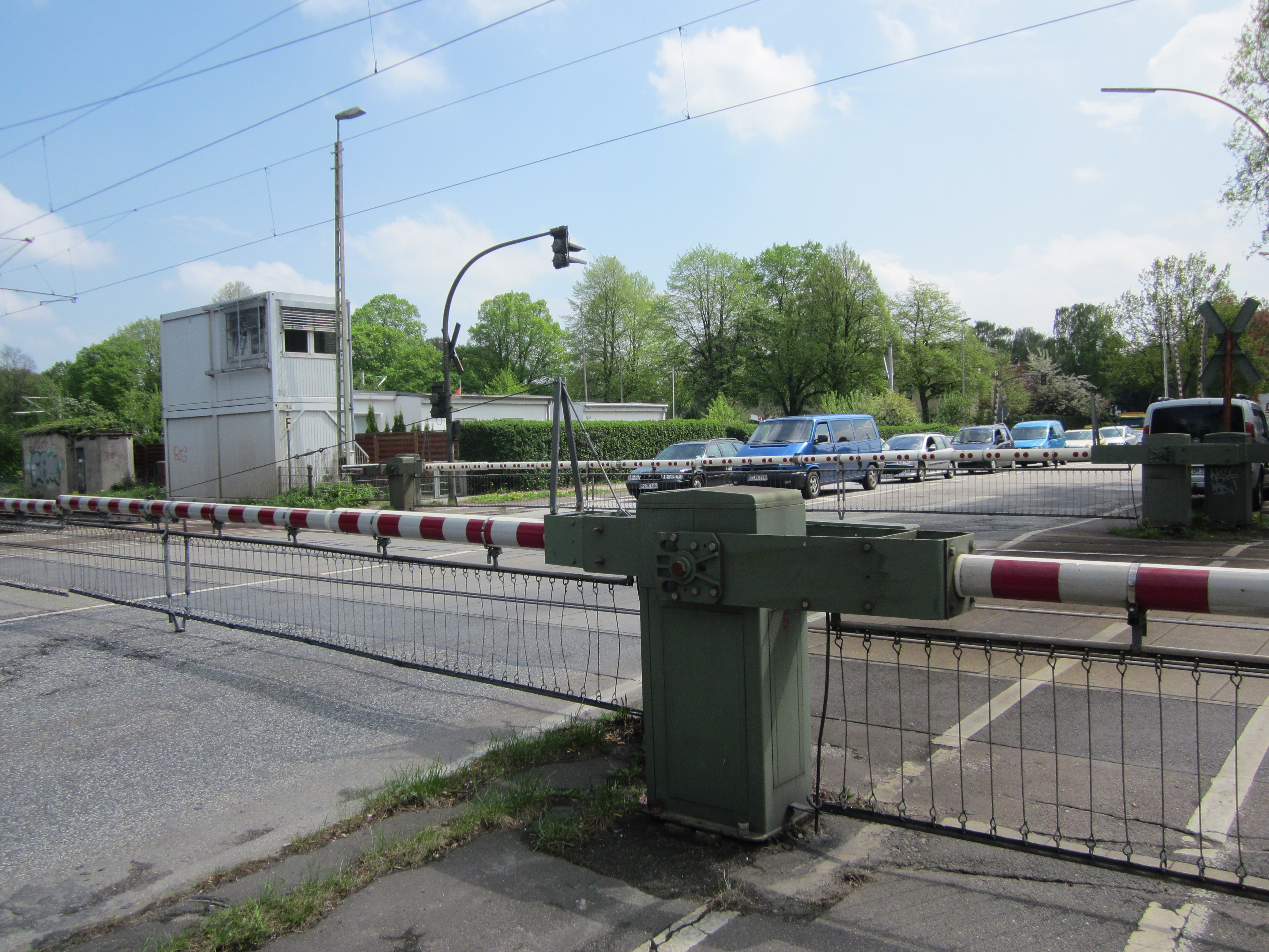 Der Bahnübergang Hammer Straße in Marienthal im Zuge der Bahnstrecke Hamburg-Lübeck im "Urzustand". Bis 2018 soll er ebenso wie der dahinterliegende Übergang über den Abzweig zur Güterumgehungsbahn einer Unterführung weichen.